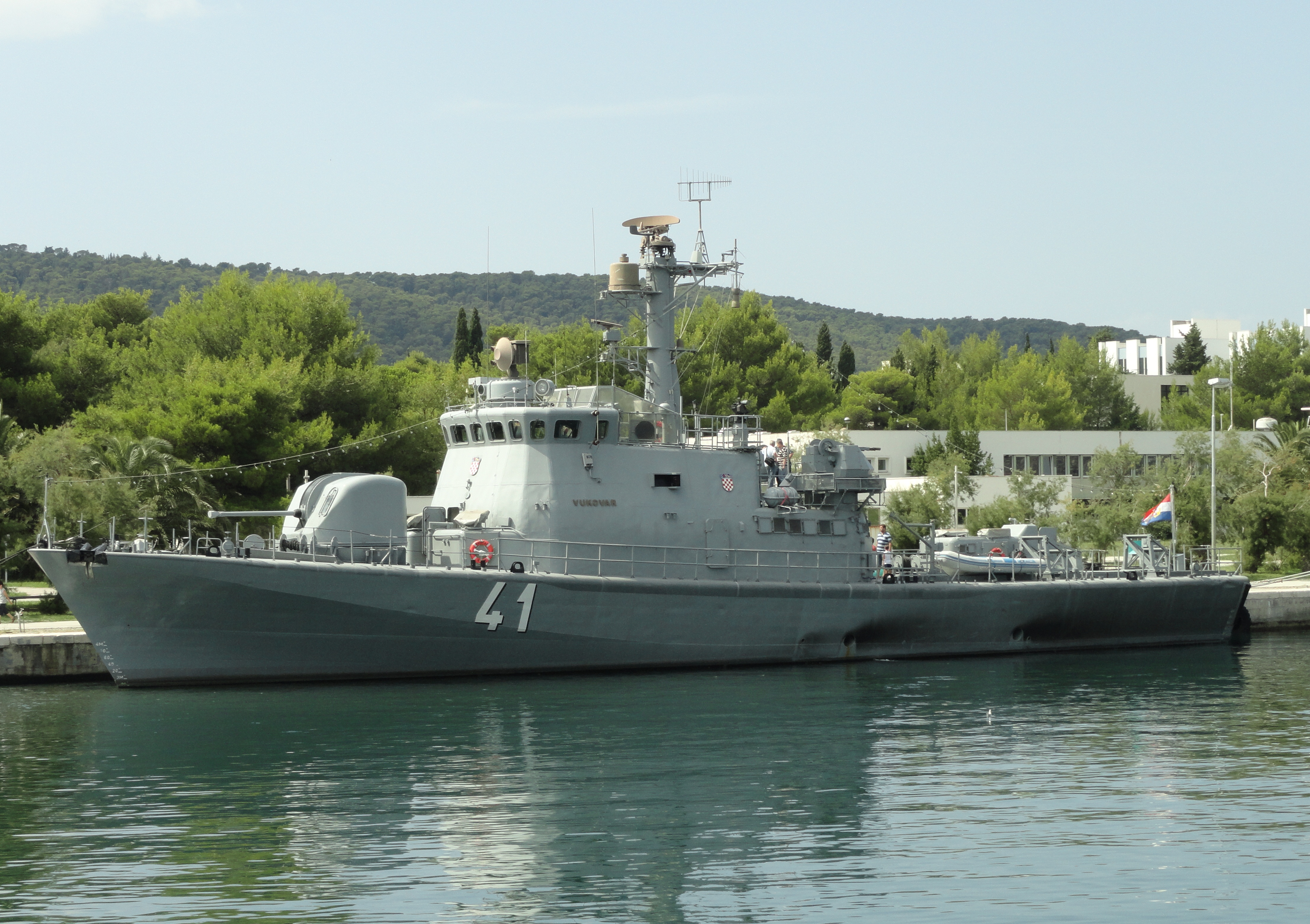 RTOP-41 Vukovar u Lori.